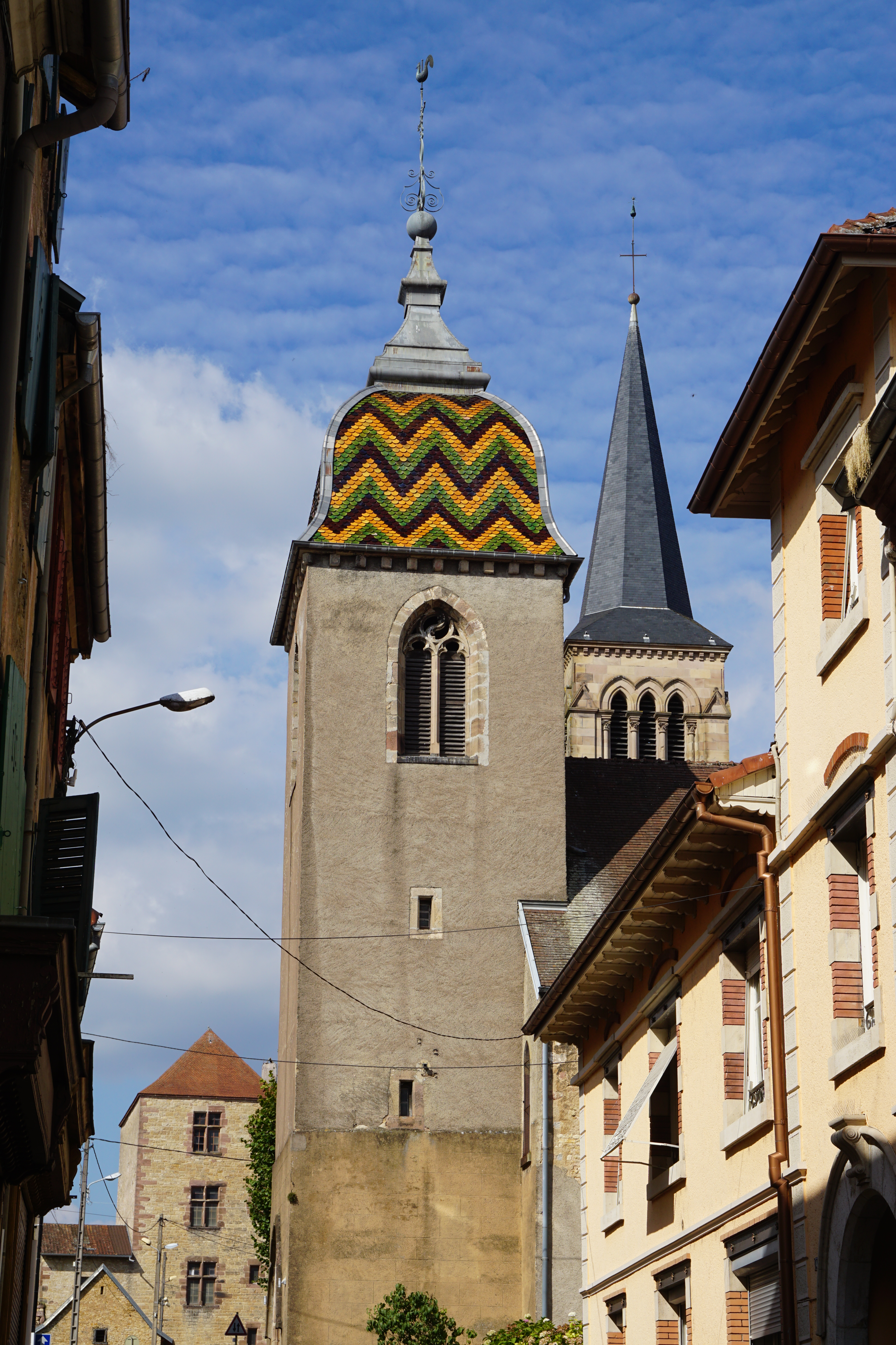 Les deux églises (luthérienne et catholique) Saint-Christophe d'Héricourt.